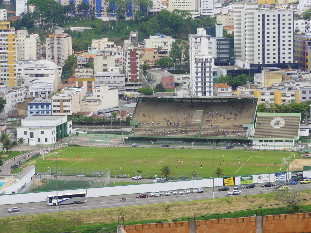 Estádio José Procópio Teixeira, campo do Sport Club de Juiz de Fora